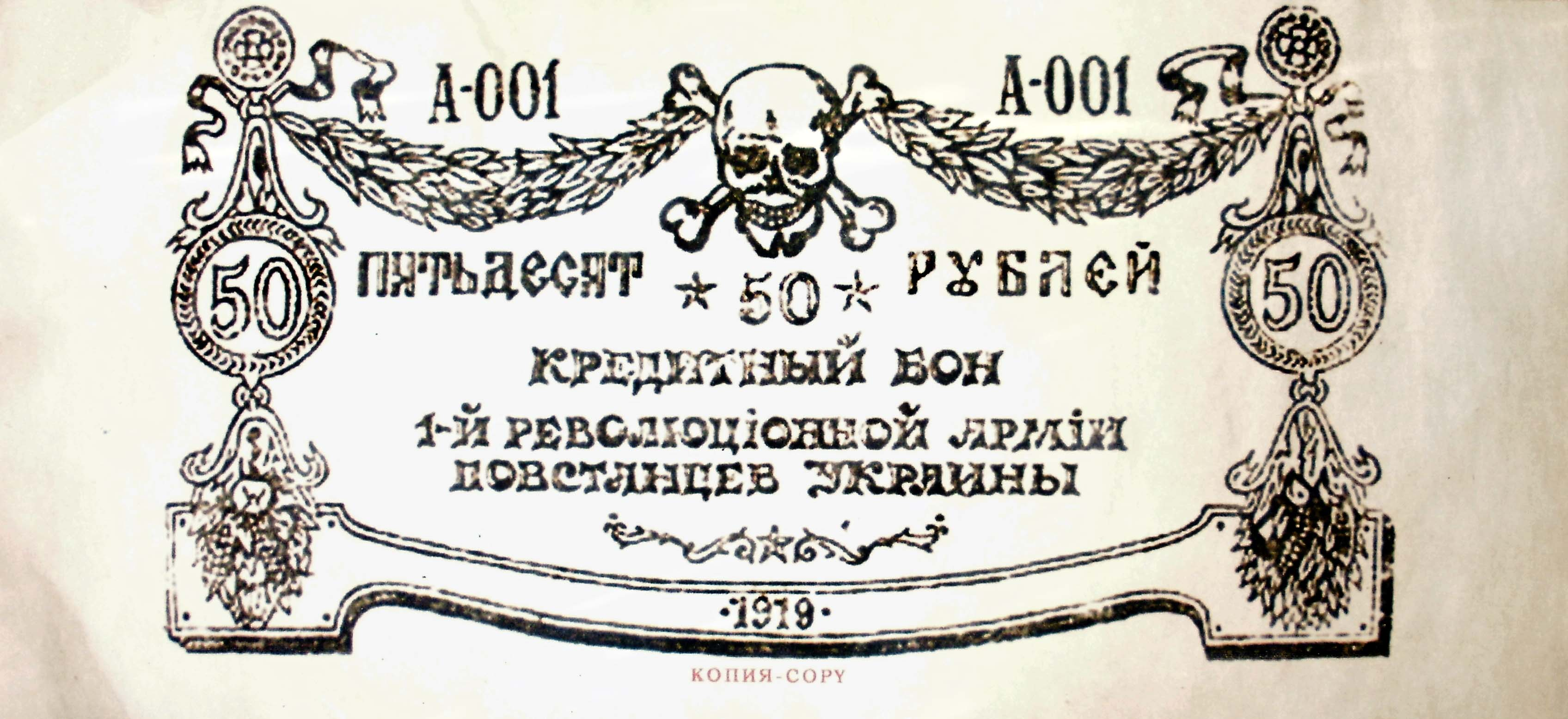 Деньги, ходящие по рукам как деньги, издаваемые Махно. На самом же деле-не более, чем выдумка. Таких денег Махно не печатал.